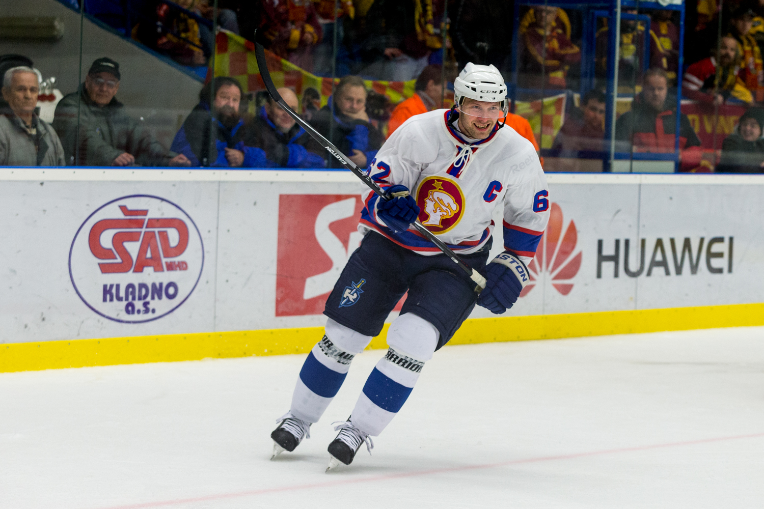 1. liga - 13.12.2014 16:00 CET - Round 34 Rytíři Kladno 4:0 (2:0, 1:0, 1:0) HC Dukla Jihlava